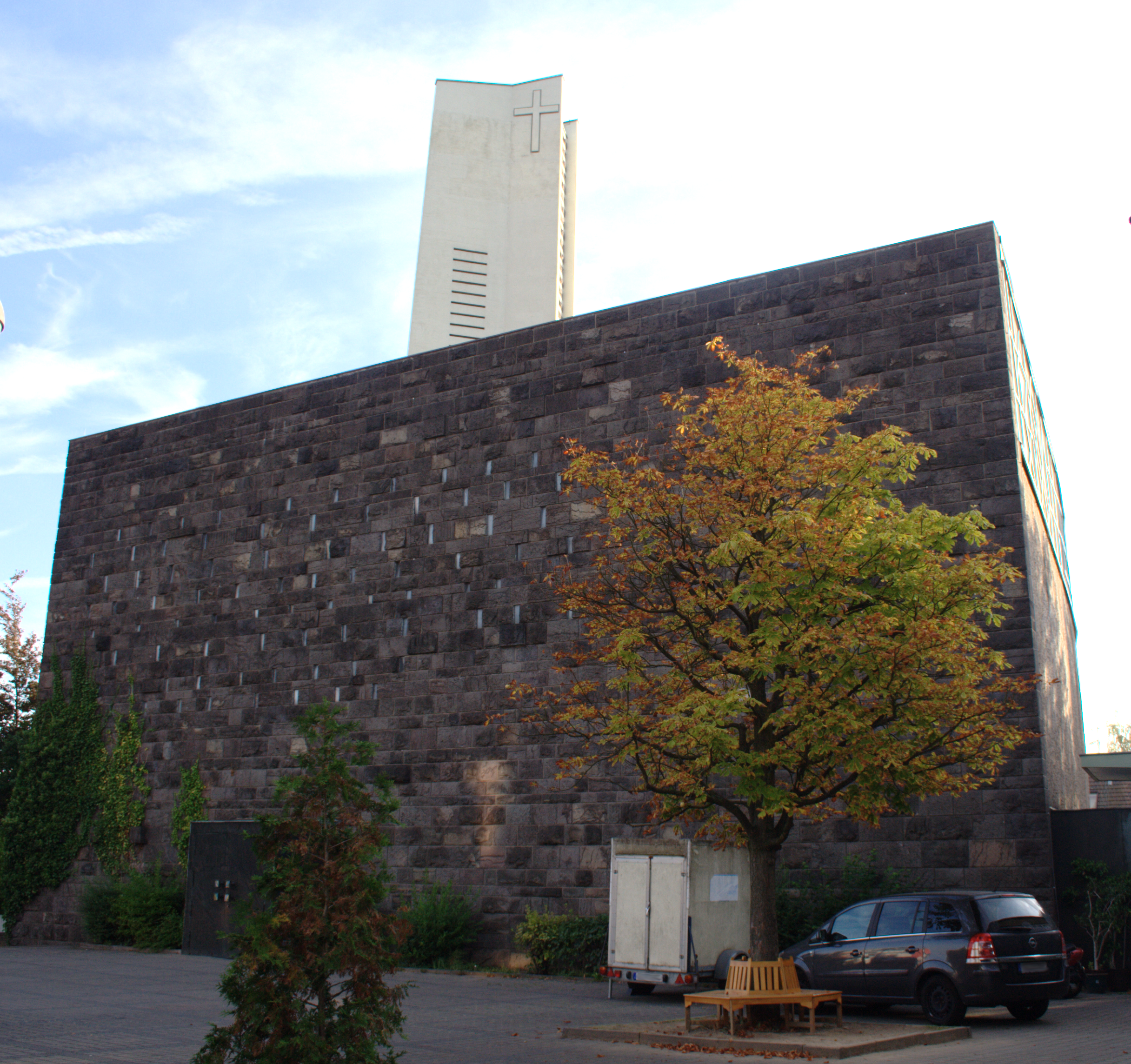 Petruskirche, Wartweg 7, Giessen